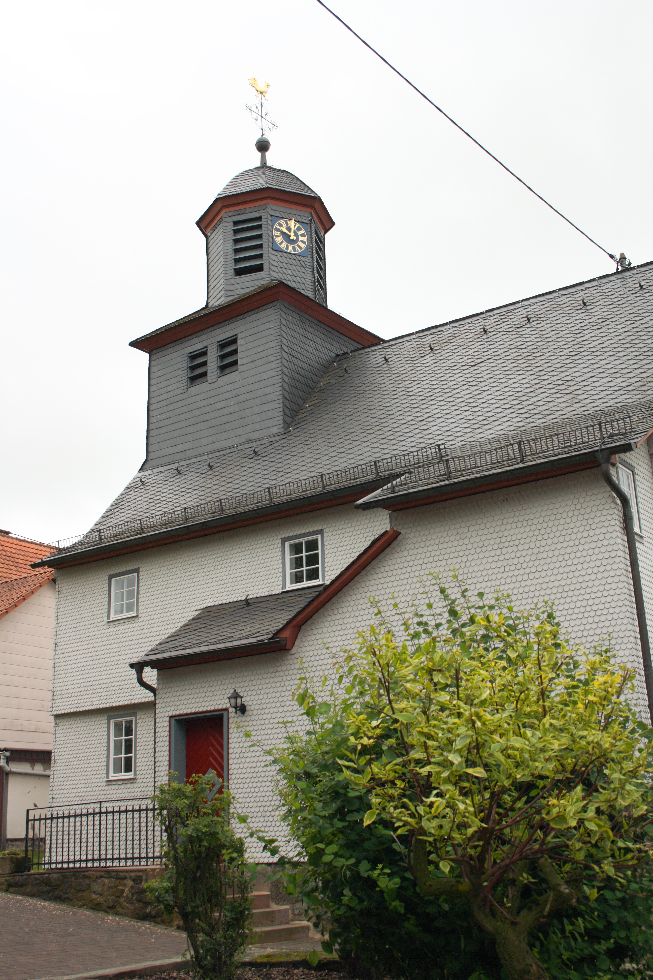 Evangelische Kirche in Meiches, einem Ortsteil von Lautertal im Vogelsbergkreis (Hessen)